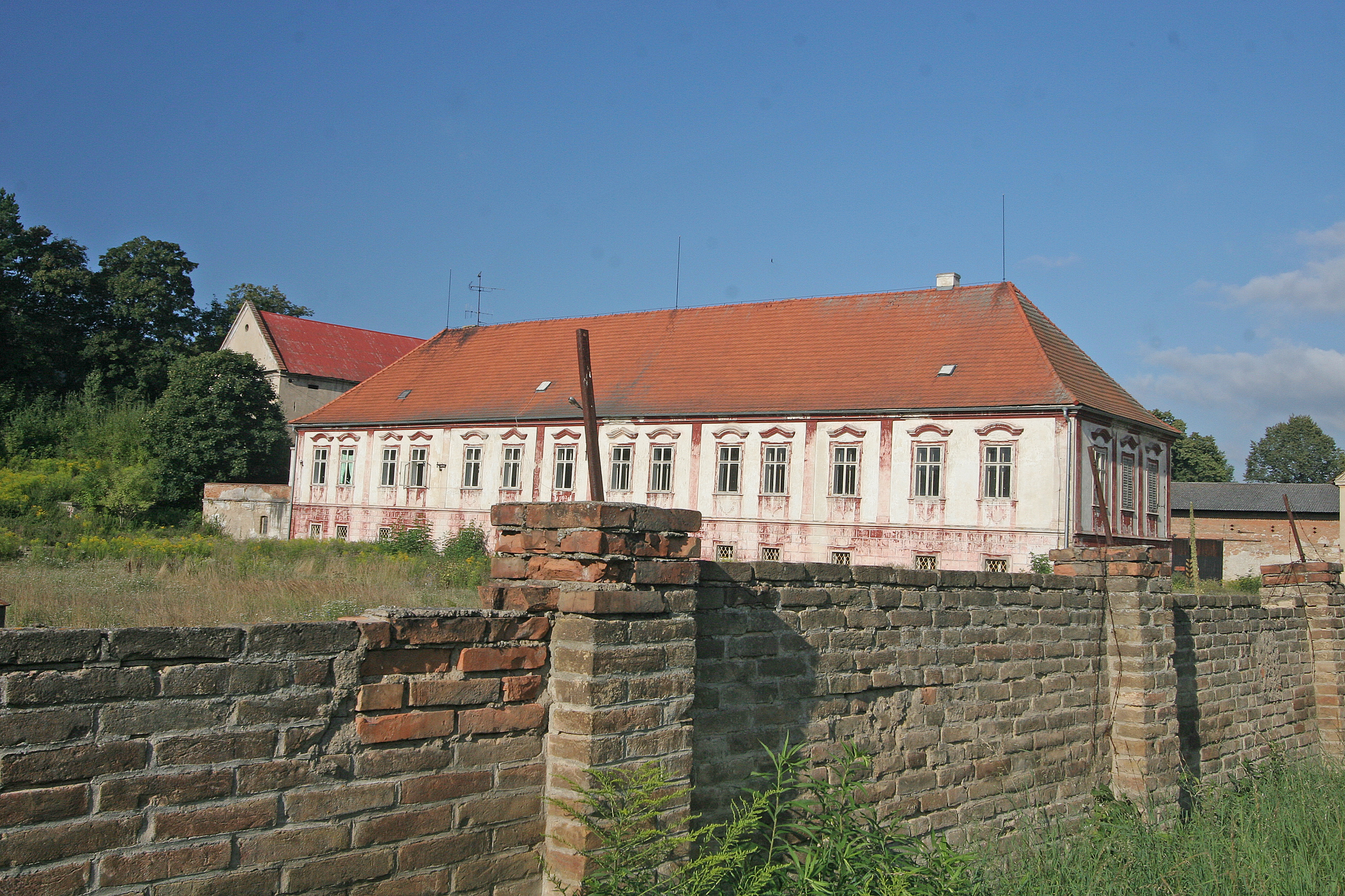 Zámek Sukorady, Sukorady 1